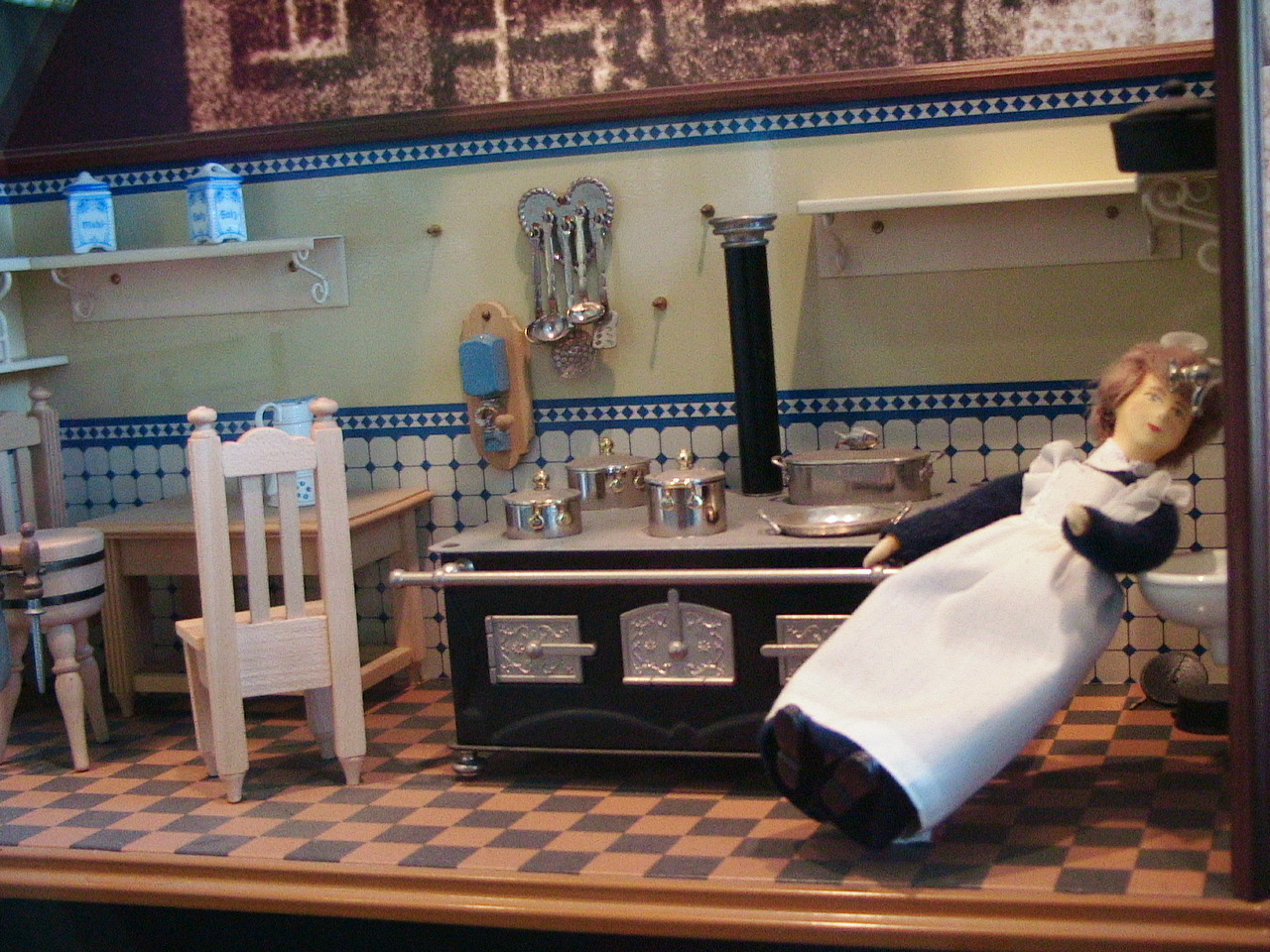 Cuisine de poupée fabriquée autrefois par Märklin Photo prise par F5ZV le 8 mai 2006 dans le musée Märklin